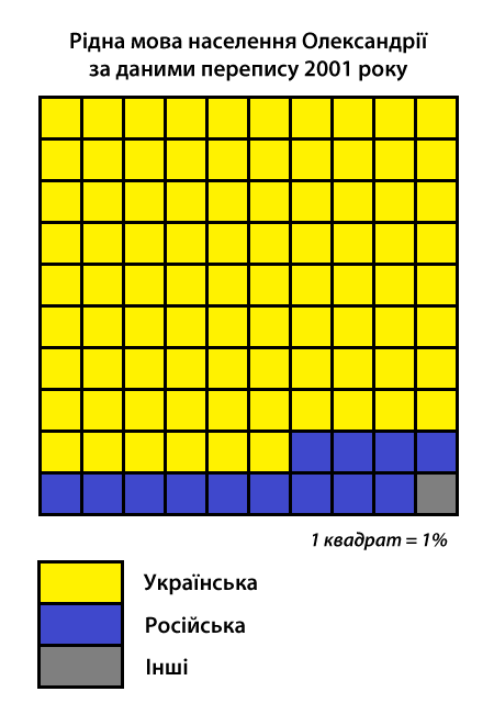 Інфографіка розподілу населення міста Олександрія за рідною мовою згідно з даними перепису 2001 року. Джерело: Розподіл населення Кіровоградської області за рідною мовою (у % до загальної чисельності населення) за переписом 2001 року